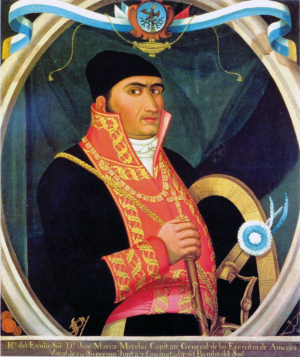 Retrato de José María Morelos (1765-1815) en traje de capitán general de los ejércitos del sur.